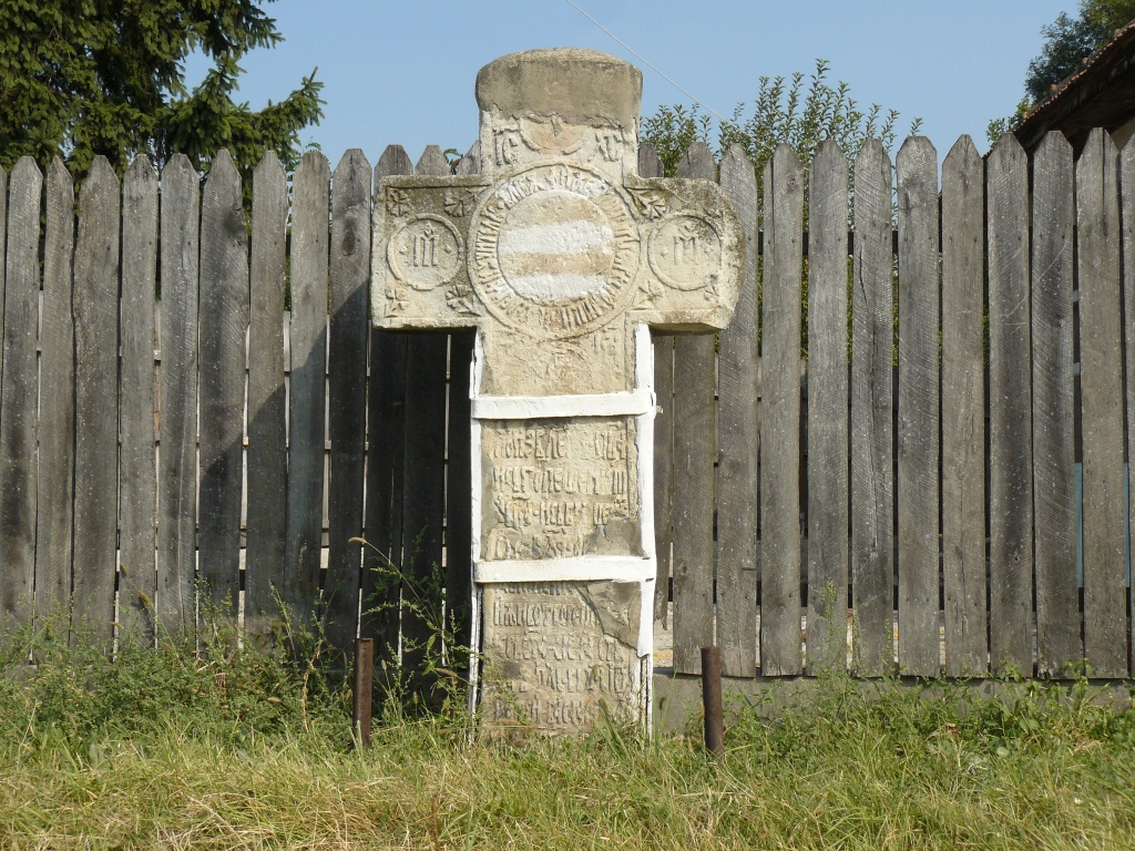 Cruce de piatră